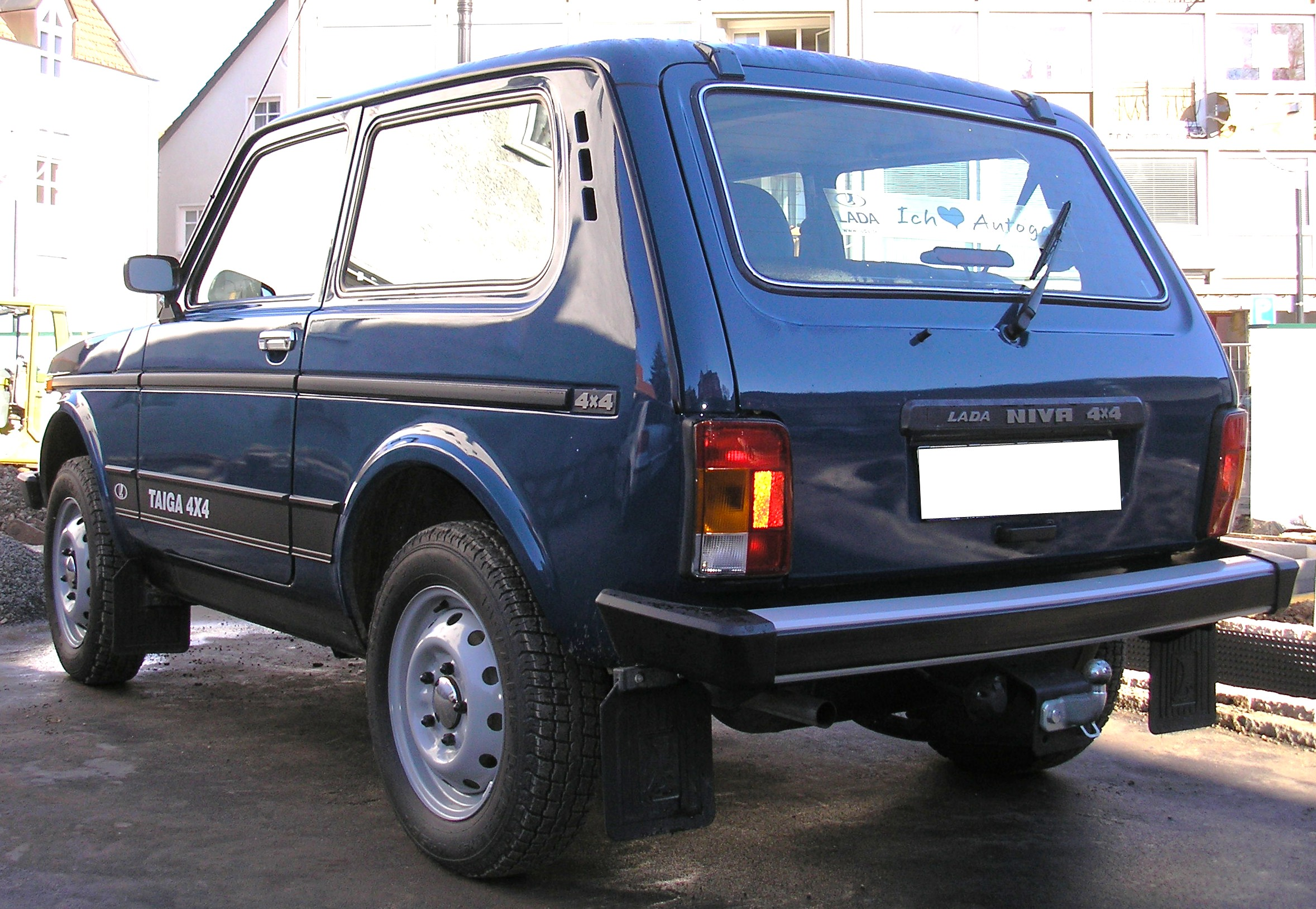 Lada Niva, late version